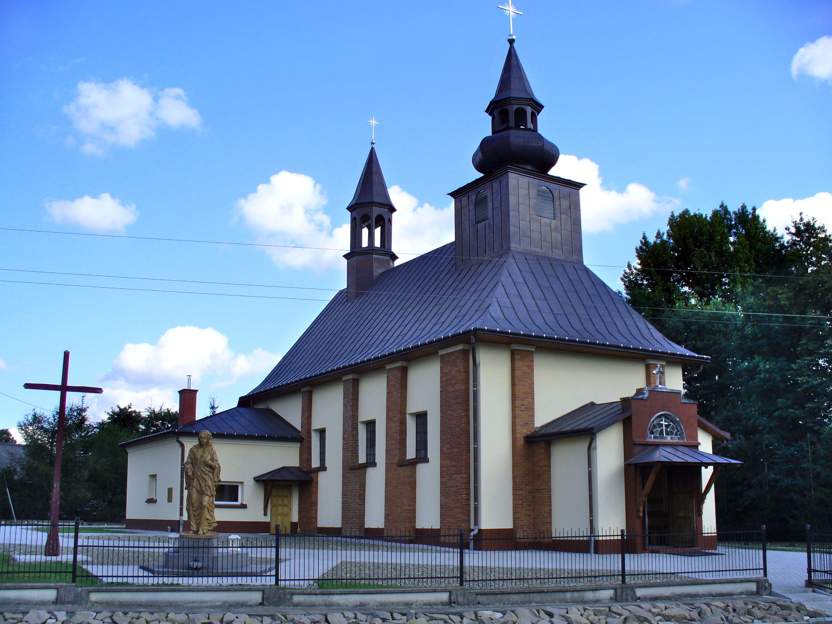 Jabłonica Polska